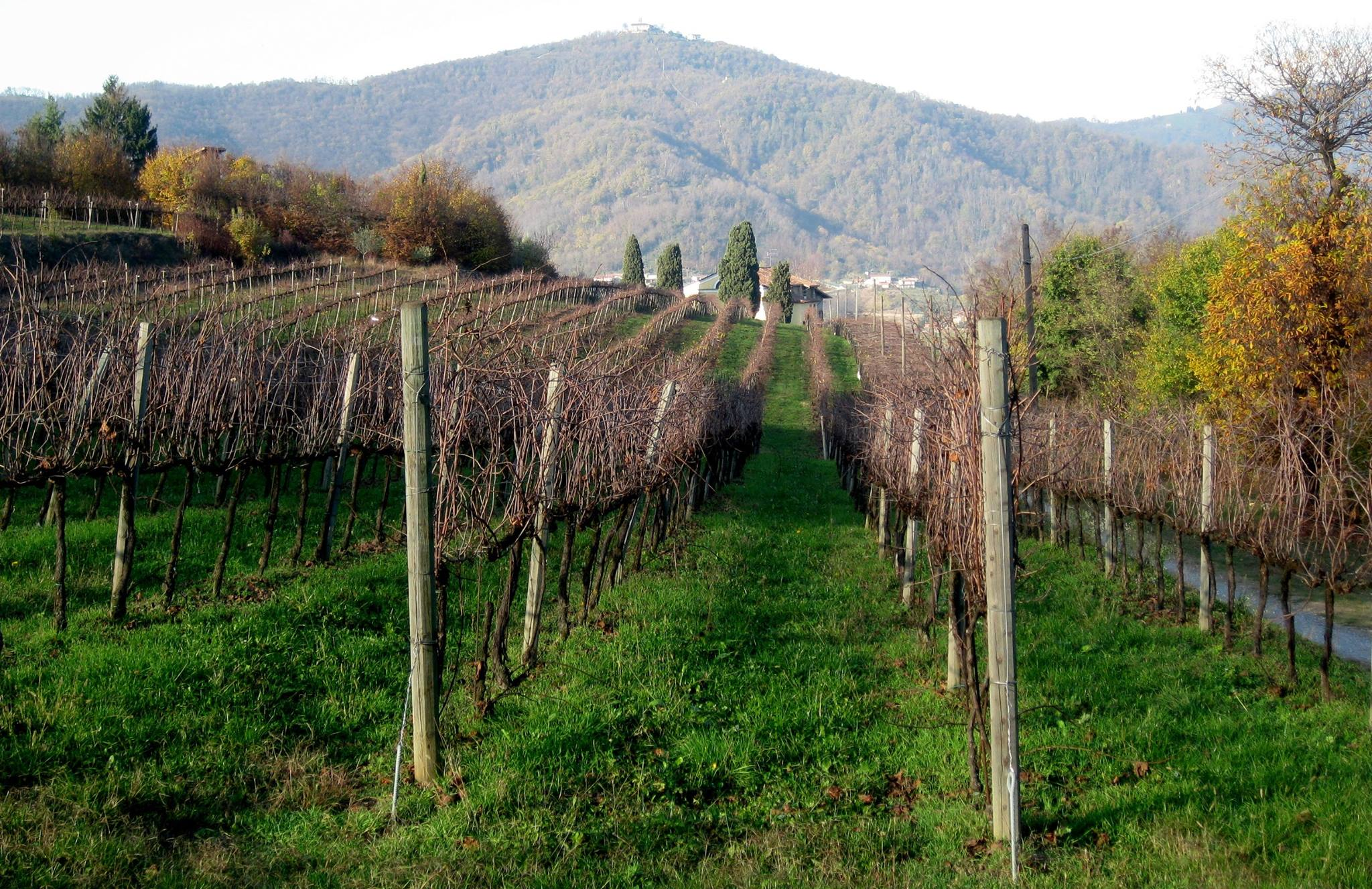 Filari di Vite